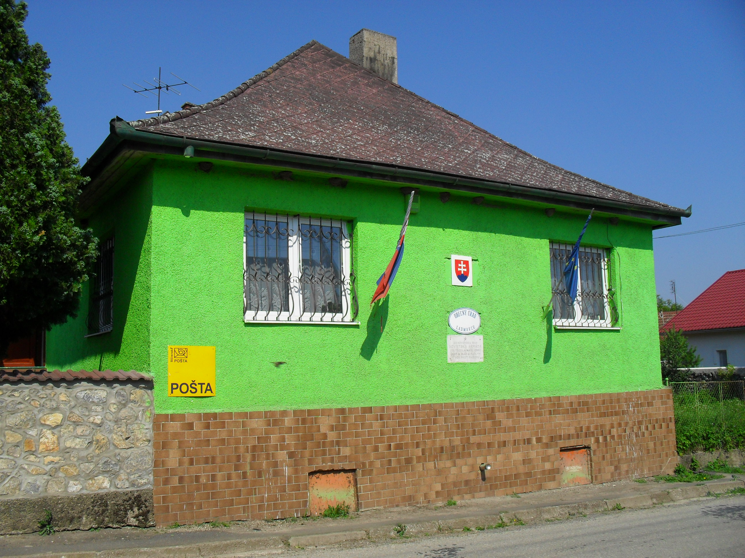 Ladmóc - községi hivatal és posta